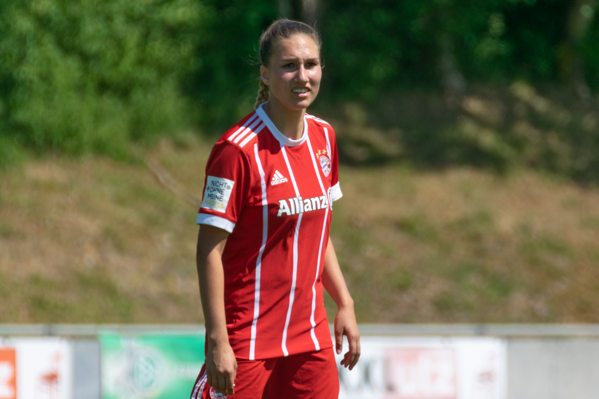 Jana Kappes - 2. Frauenbundesliga vs Schott Mainz, 2017/18